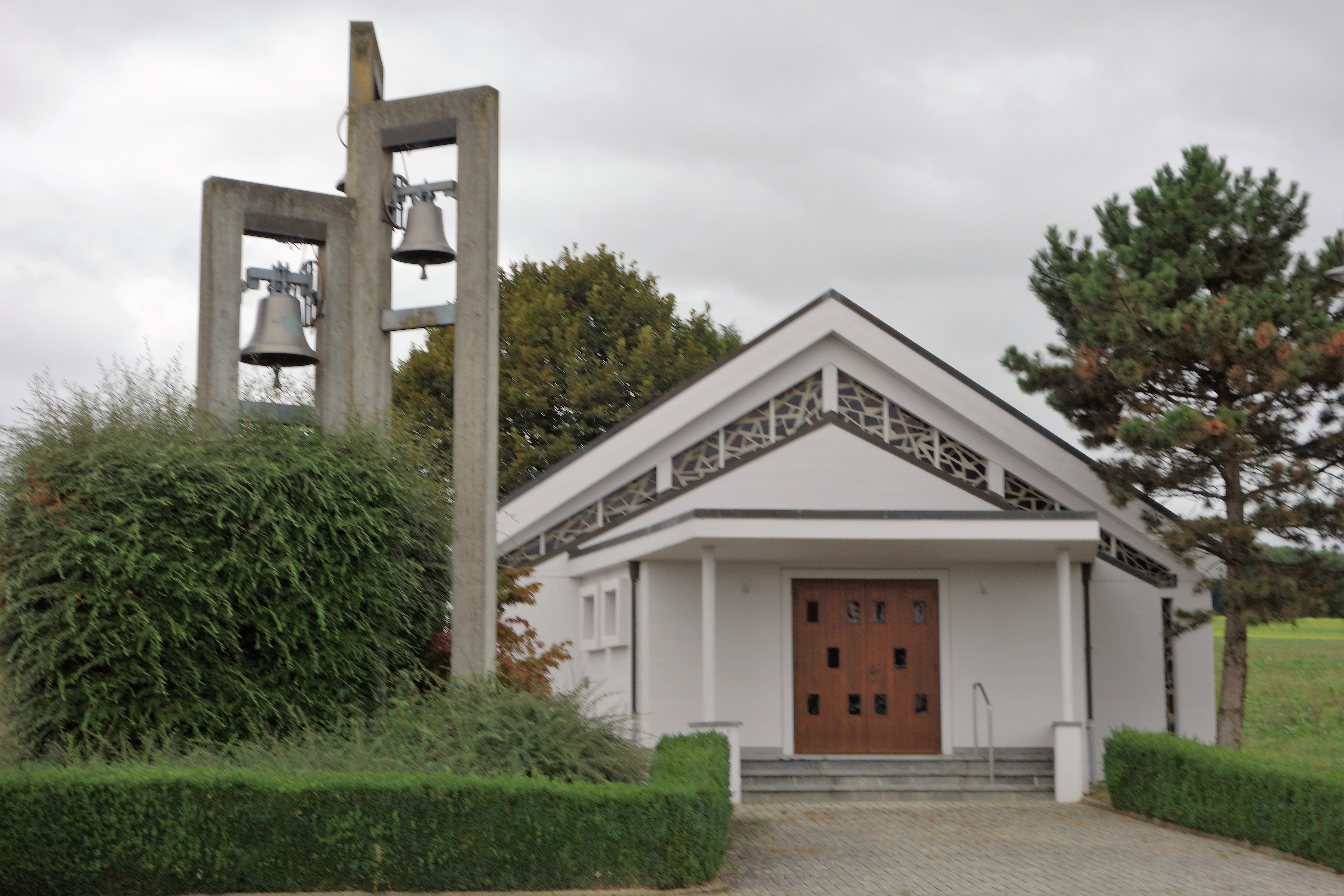 Lussery-Villars (canton de Vaud - Suisse) - chapelle de la Fusion construite lors de fusion de Lussery et de Villars en 1999